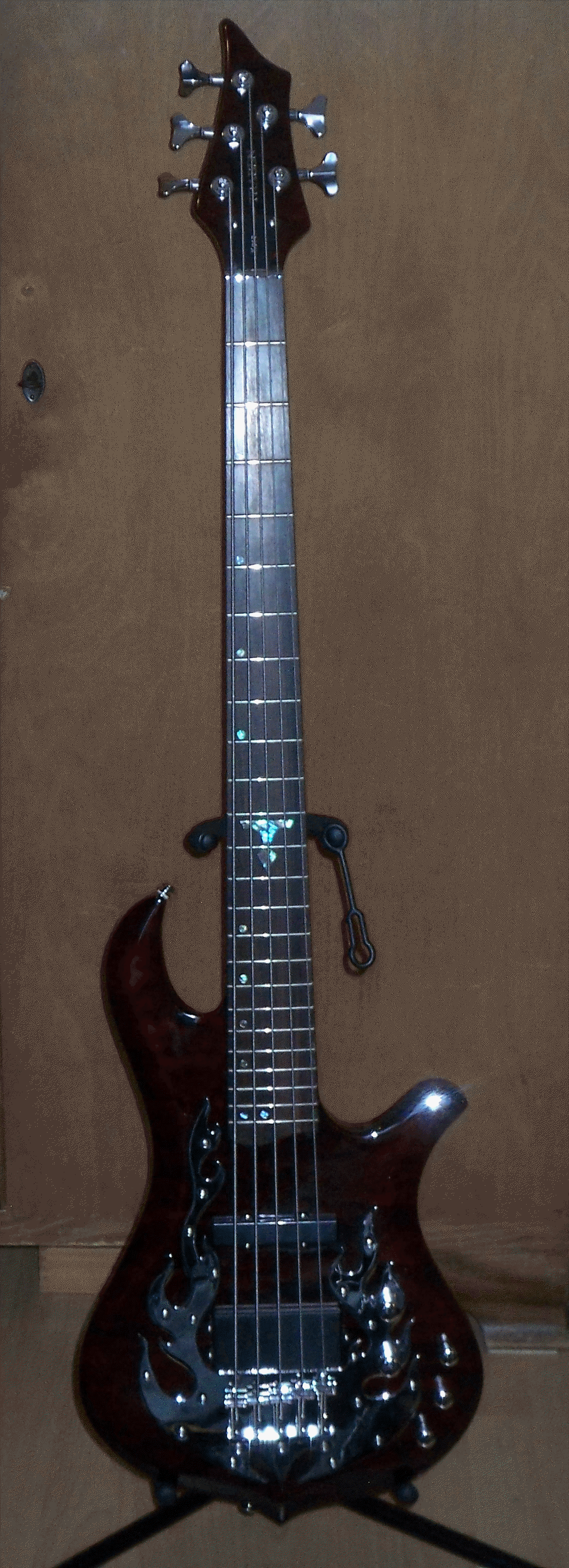 5-saitiger Kore von Traben (en: Traben)